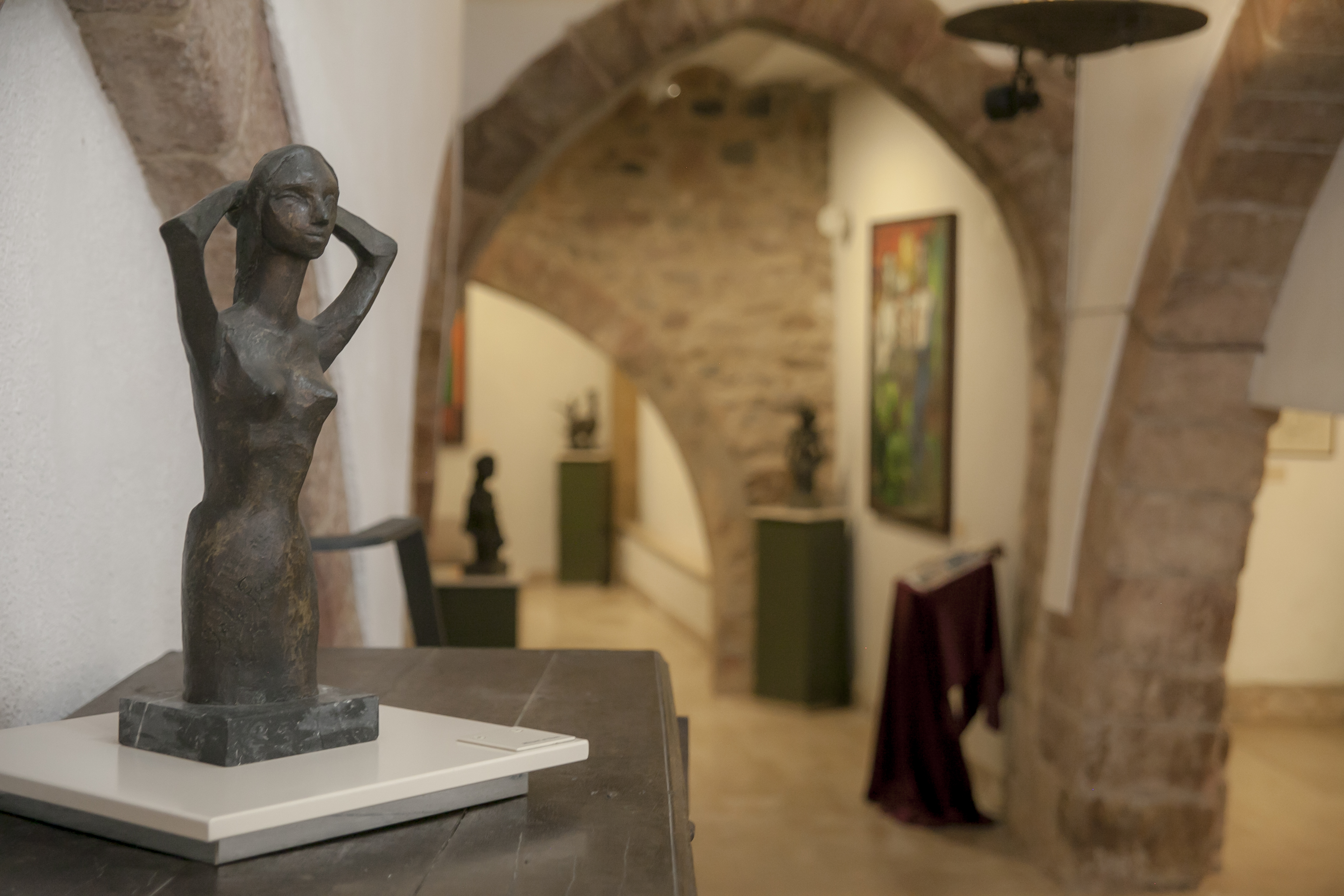 Museo de Arte Palau Ferré de Montblanc